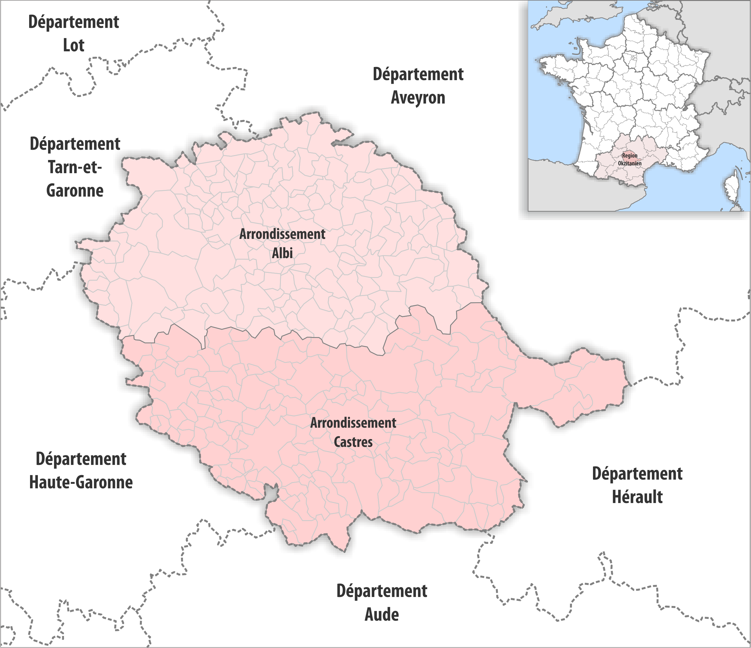 Gemeinden und Arrondissemente im Departement Tarn